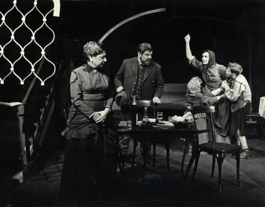 Ivan Cankar, Kralj na Betajnovi, Drama SNG v Ljubljani. Na fotografiji: Vida Juvan (Hana), Stane Sever (Jožef Kantor), Ivanka Mežan (Lužarica).